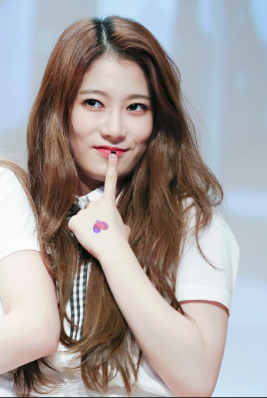 한국어 (조선): 170514 레나